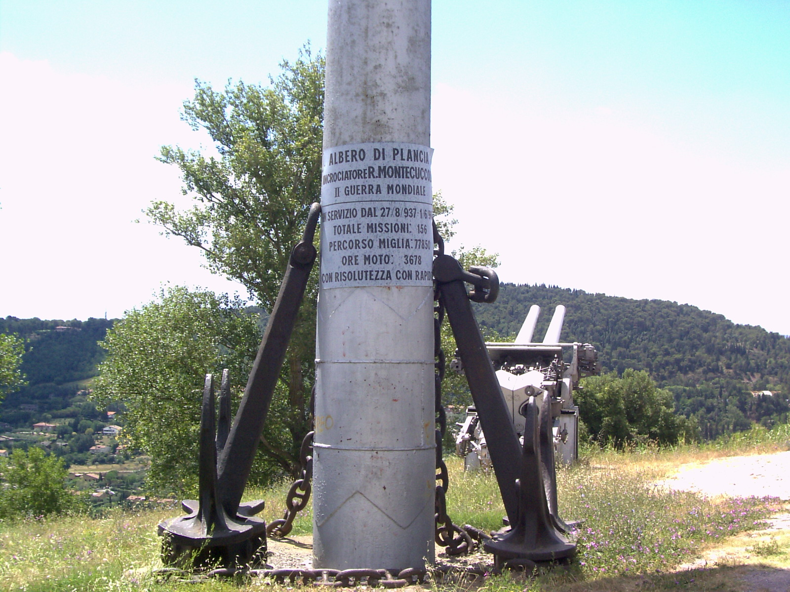 Montecuccoli memorial-1